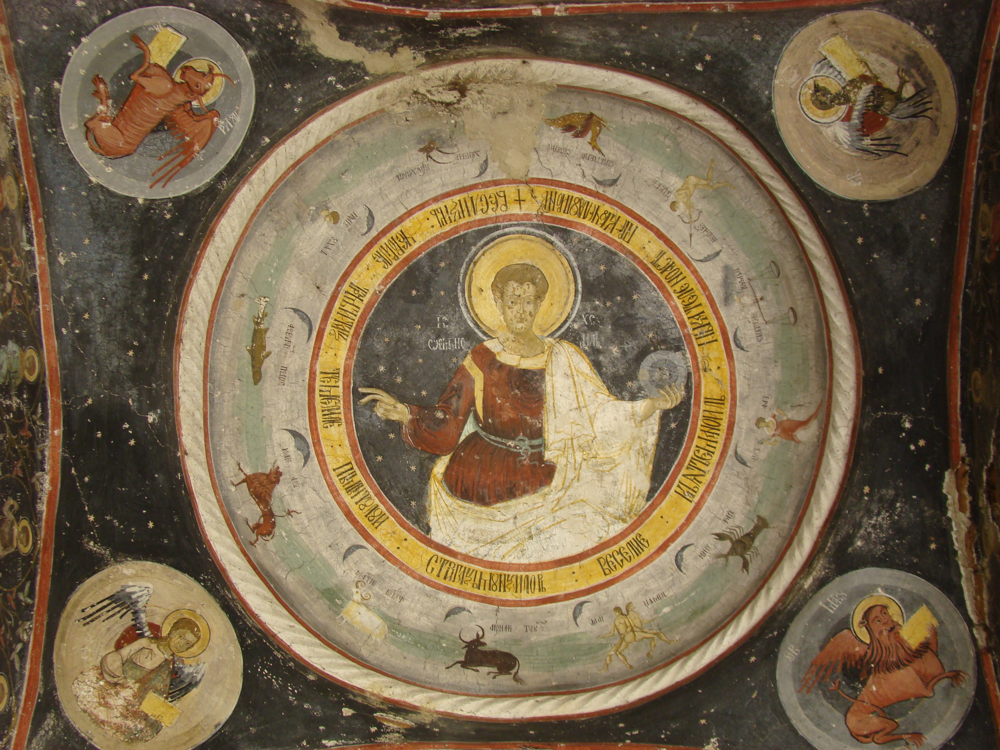 Ansamblul bisericii "Sf. Ioan Botezătorul"